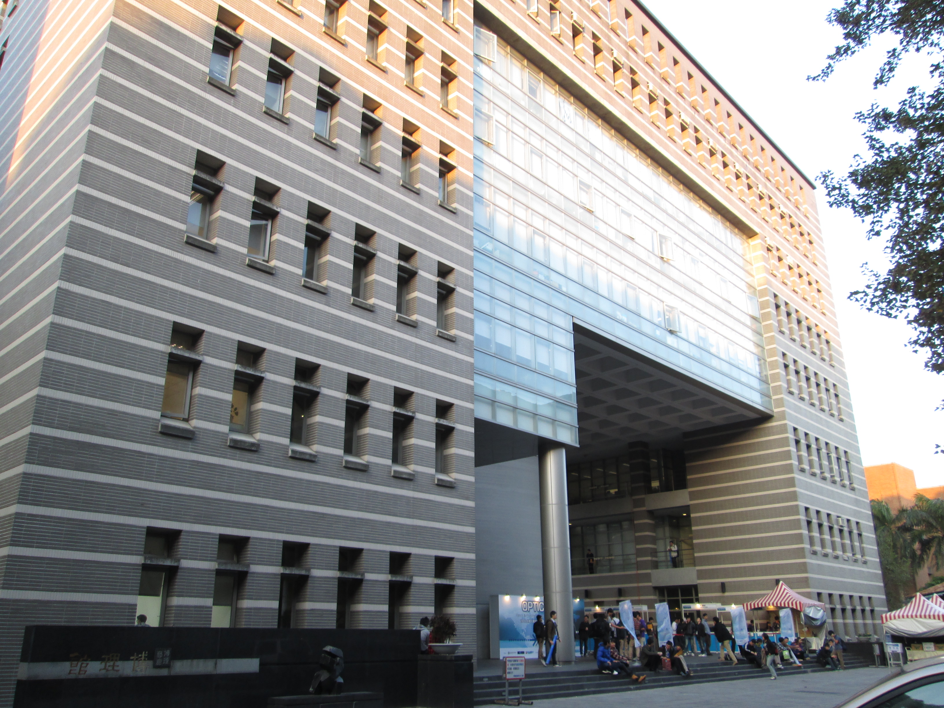 中文（台灣）: 博理館南側。